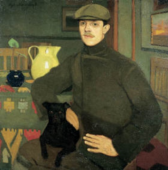 Oscar Ghiglia Porträt Paul Alexander (Siehe auch File:Amedeo Modigliani 047.jpg